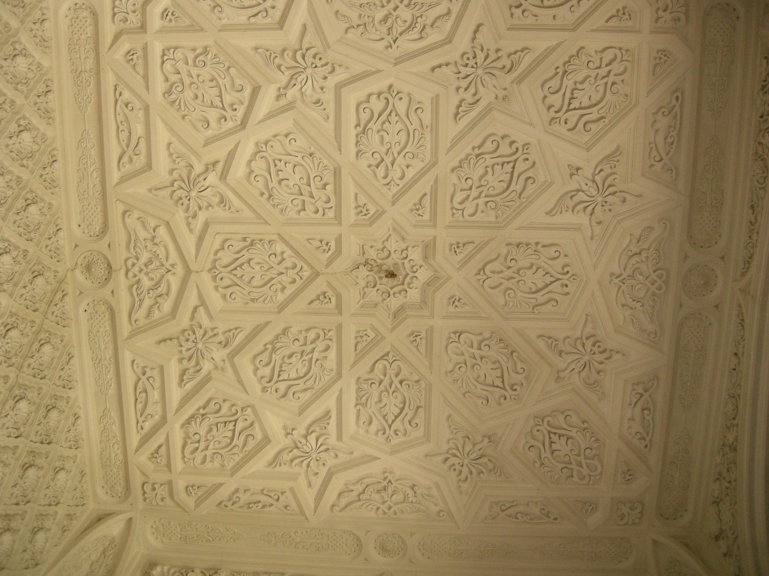 Sammezzano, sala del nodum solve